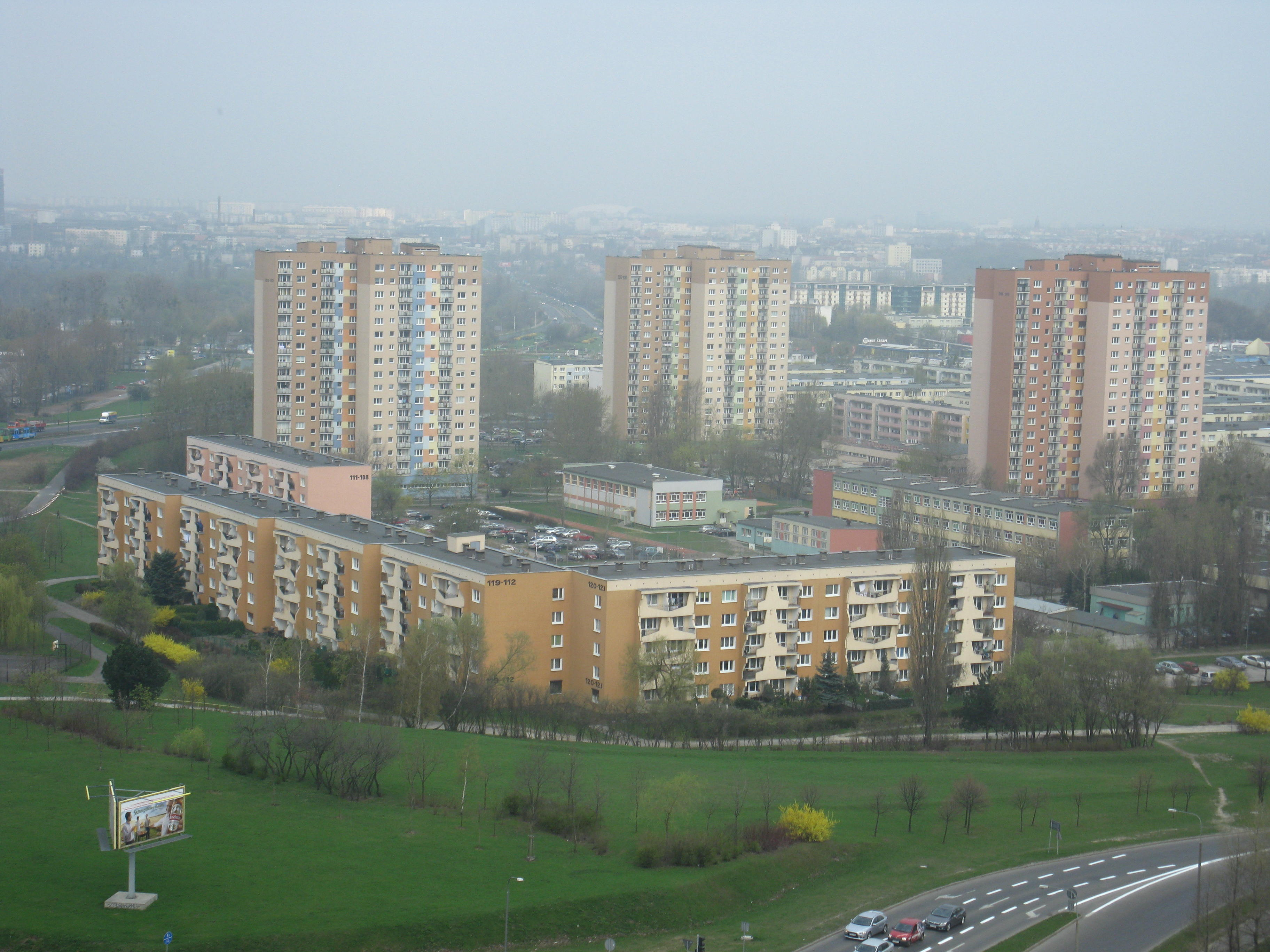 Osiedle Armii Krajowej w Poznaniu